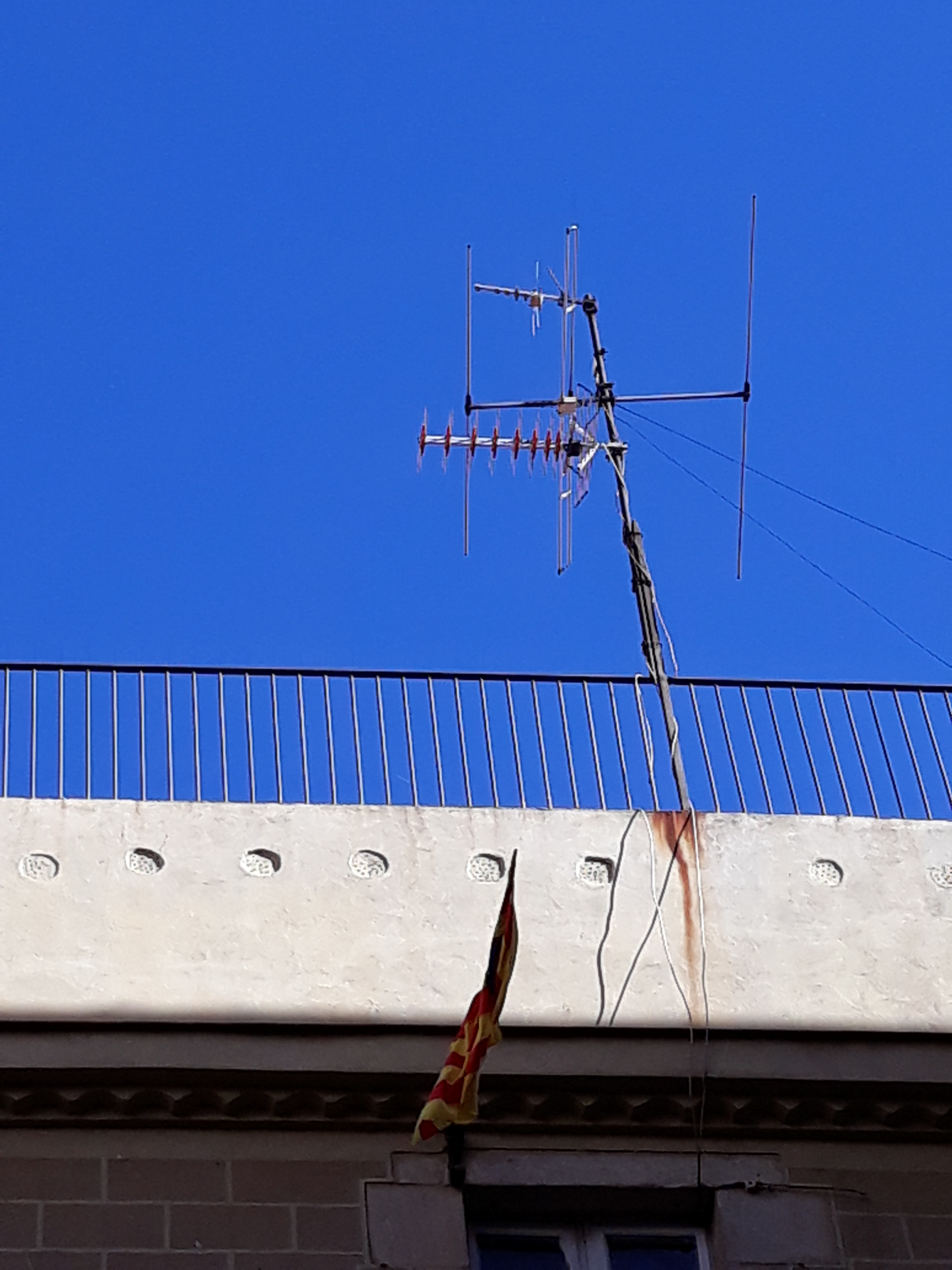 Antena de televisión, carrer Banys Vells de Barcelona